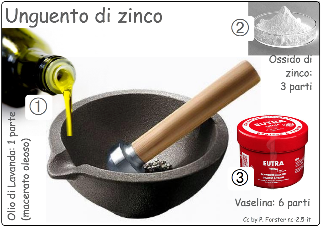 medicina popolare, pediatria, rimedi, galenica, domestica, unguento, unguento di zinco